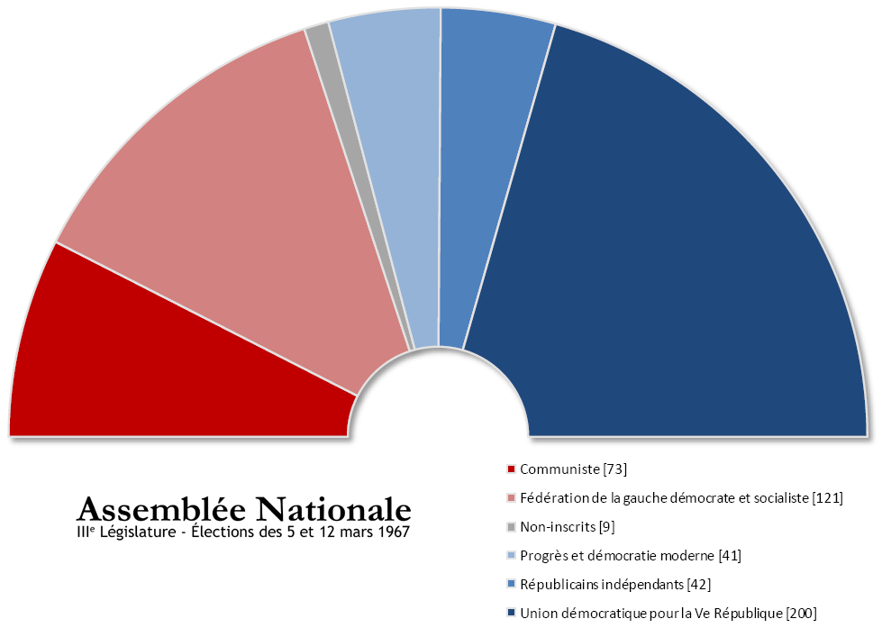 Assemblée Nationale française issue des élections de mars 1967